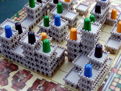 Torres, jeu de Wolfgang Kramer et Michael Kiesling